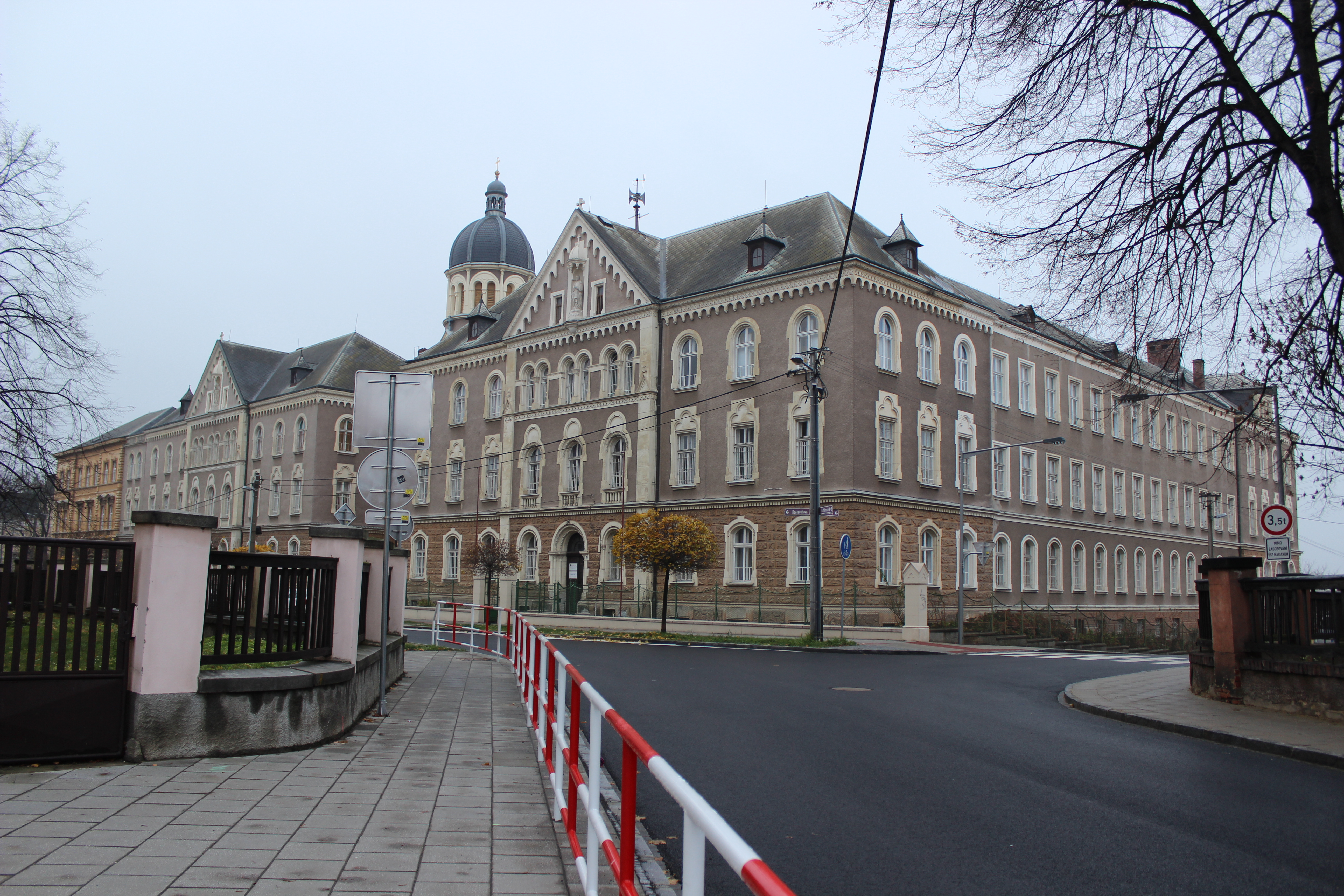 Objekt Marianum v Opavě (pohled z ulice Boženy Němcové).